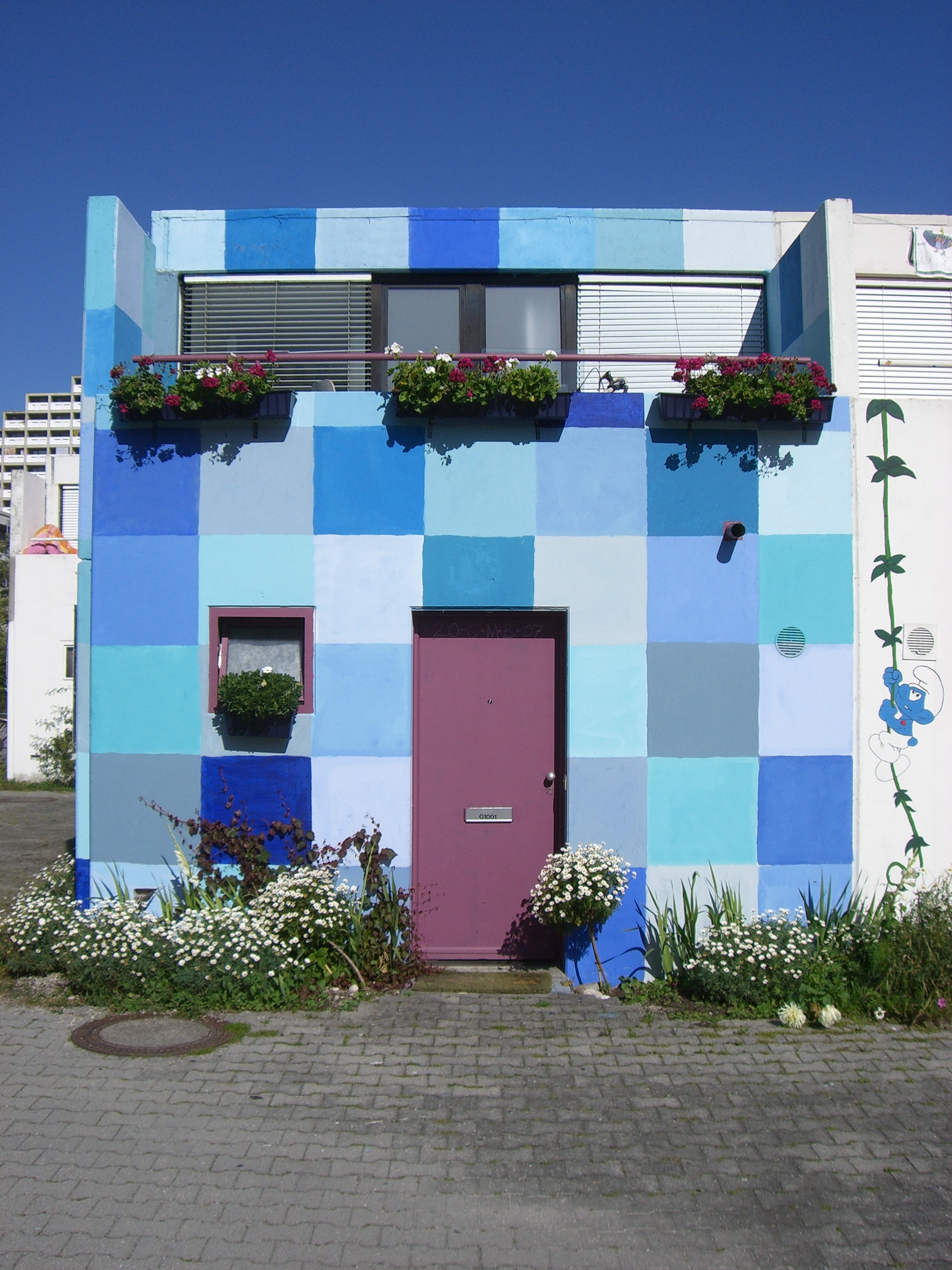 München - Olympisches Dorf (Hausanstrich).jpg